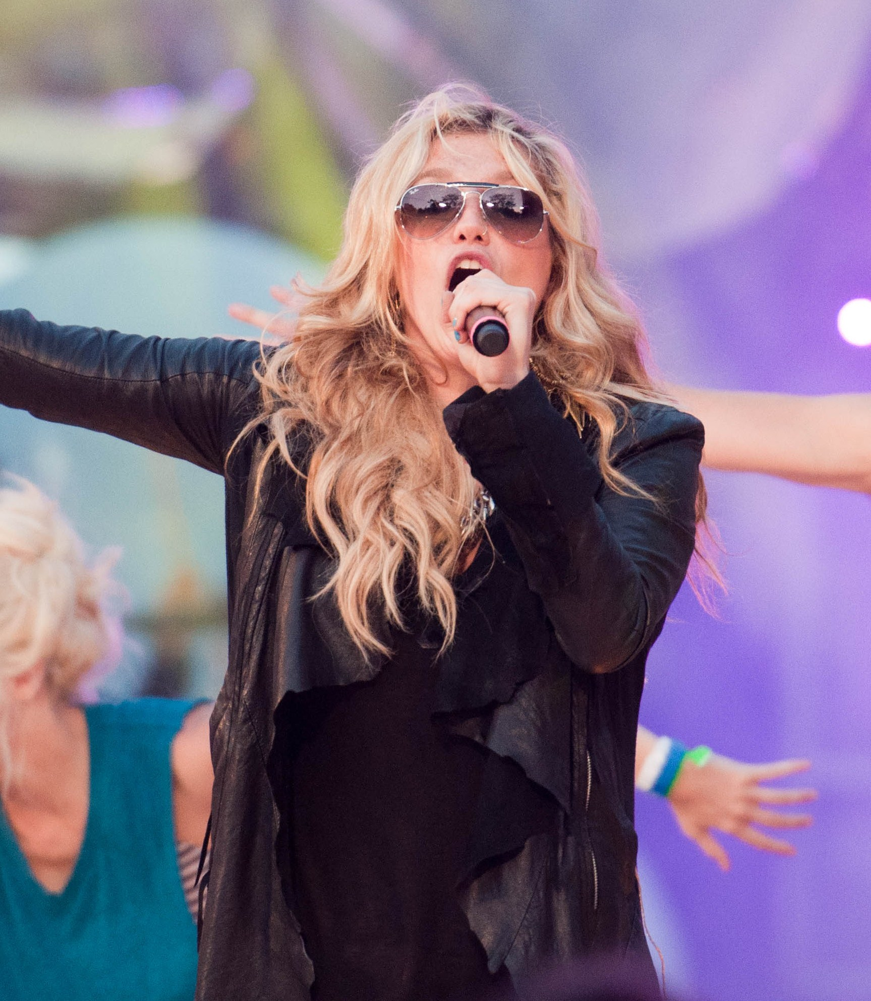 Kesha - MMVA Soundcheck